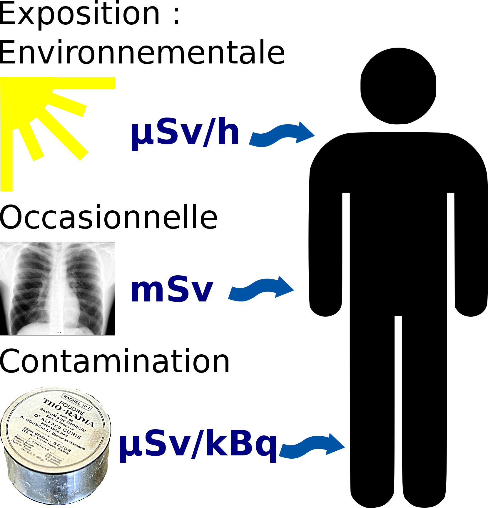 Radiation exposition modes